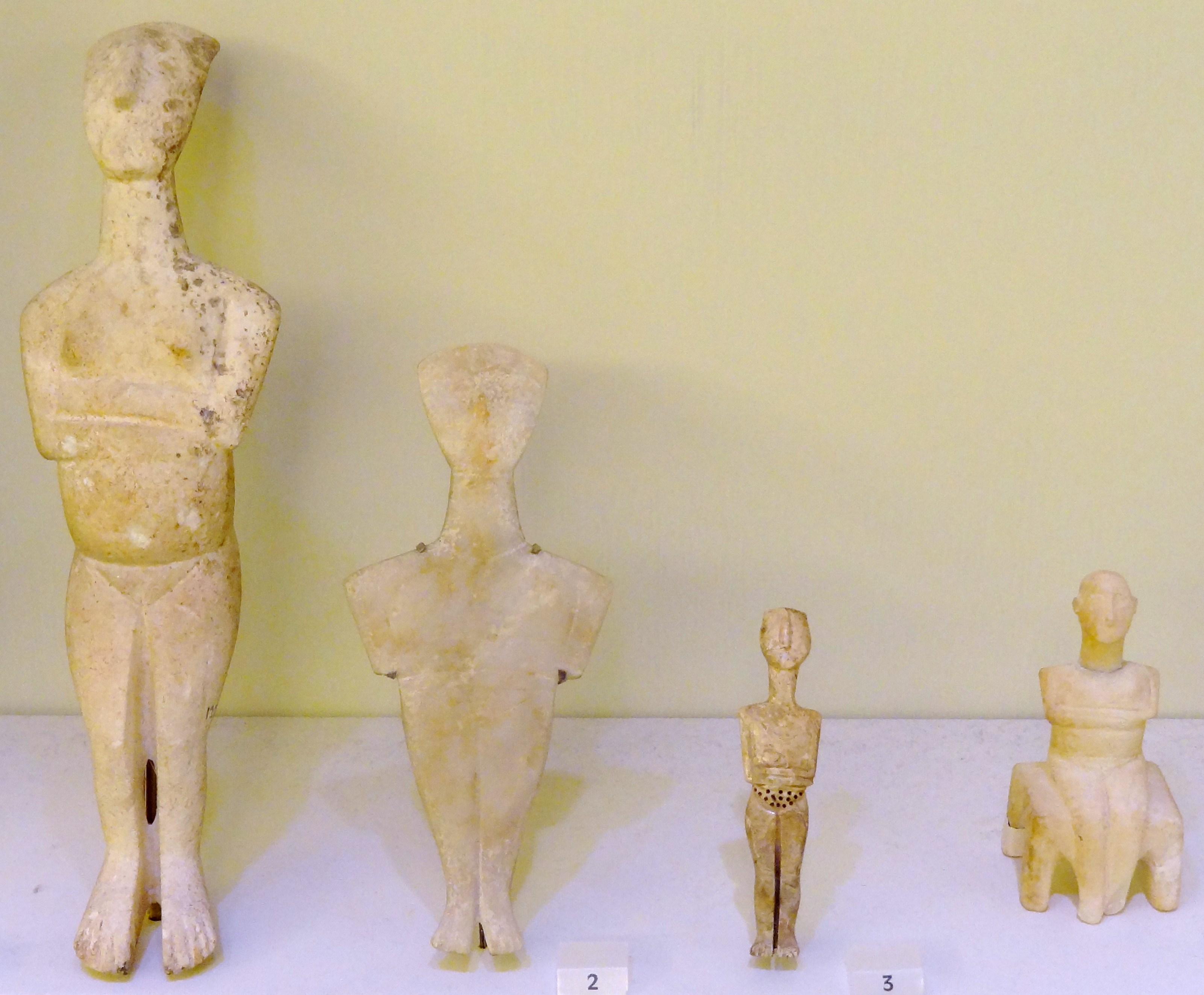 Zwei Marmorfiguren aus Koumasa (Messara), eine weibliche Elfenbeinfigur aus Phourni (Archanes) und eine sitzende Marmorfigur aus Tekes (Iraklio) im Kykladenstil (Vorpalastzeit, 2500–2300 v. Chr.), ausgestellt im Archäologischen Museum Iraklio, Kreta, Griechenland